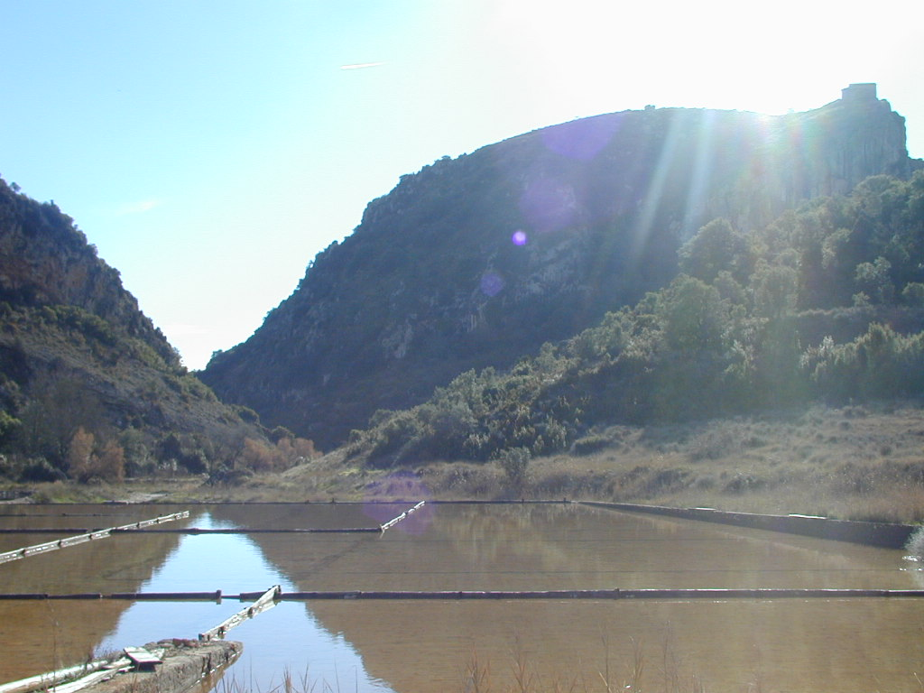 San Bartolome, Calasanz